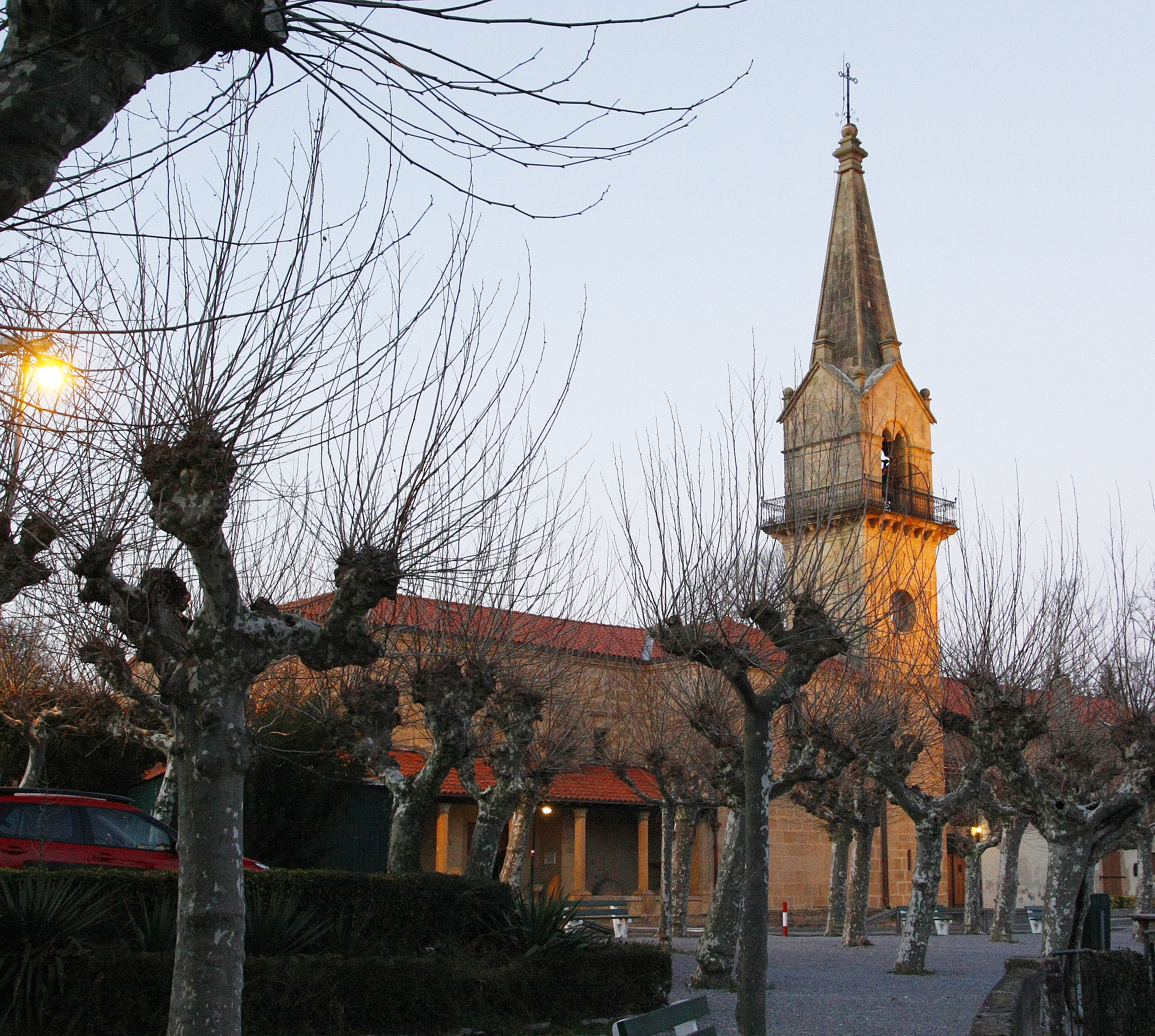 Guadalupeko Amaren Santutegia - Hondarribia